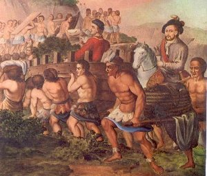 Pintura de la colonización de los nativos indígenas de Venezuela por los españoles